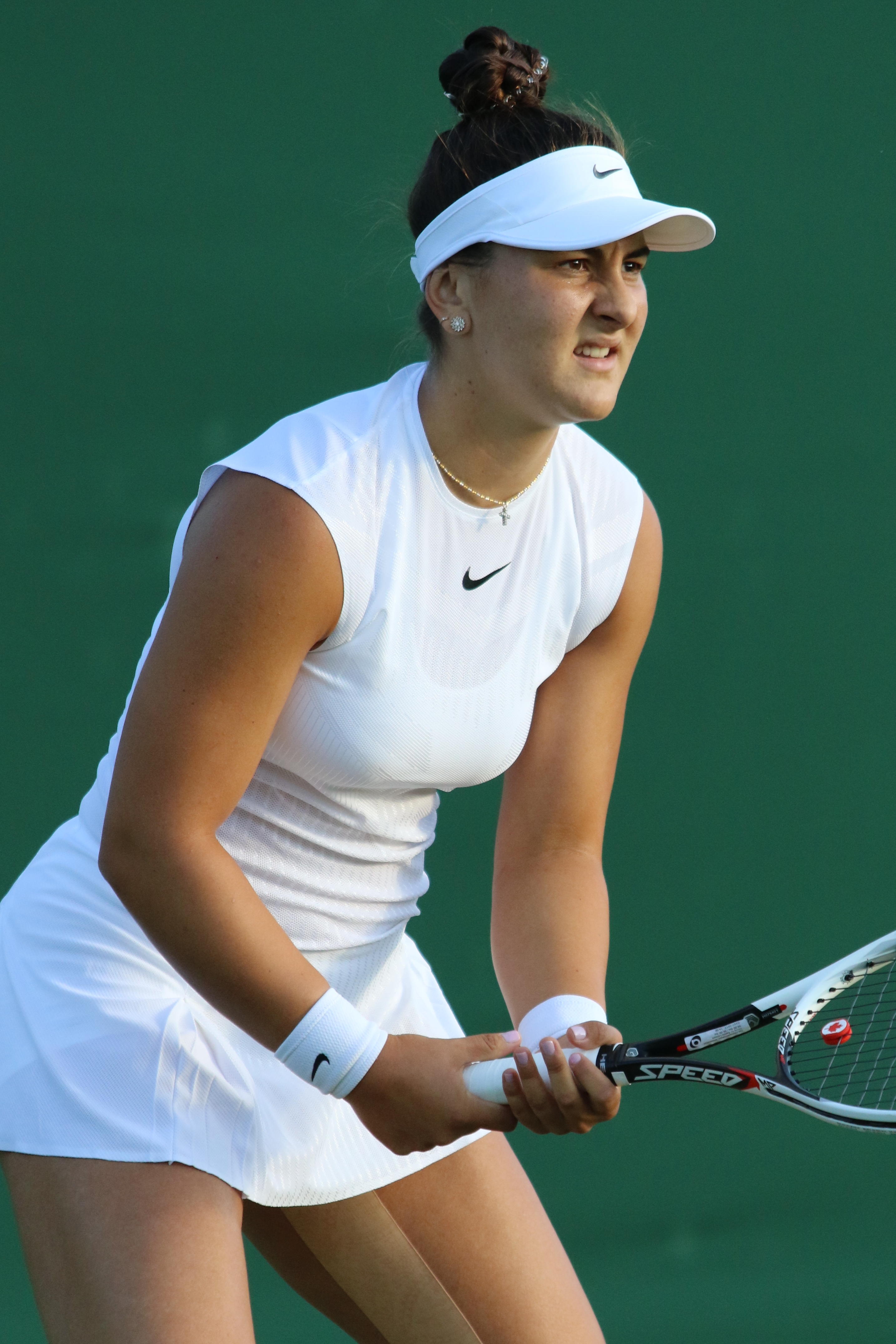 Andreescu WM17 (12)